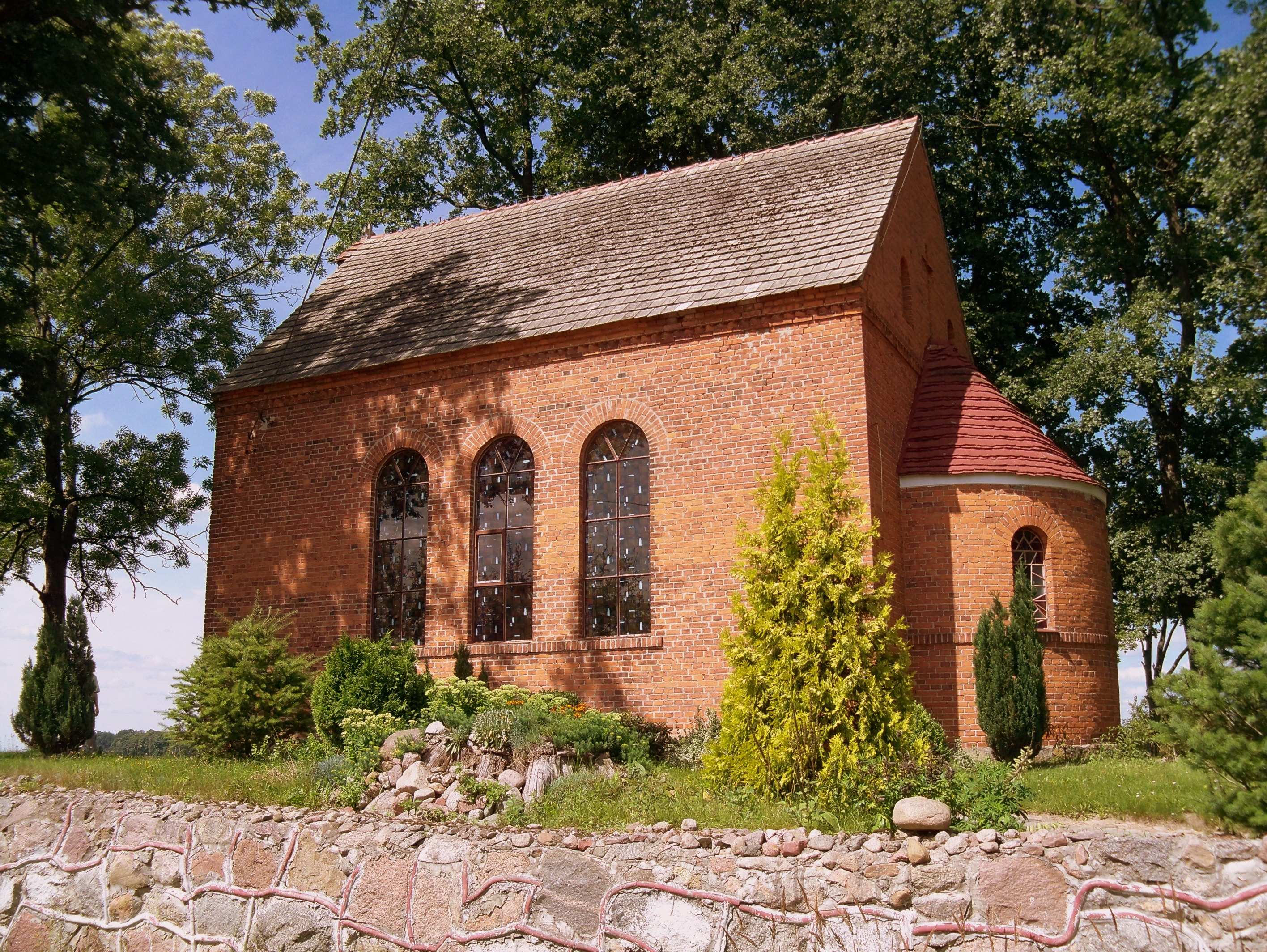 Biernów - rzymskokatolicki kościół filialny p.w. Najświętszego Serca Pana Jezusa. 09.2008.